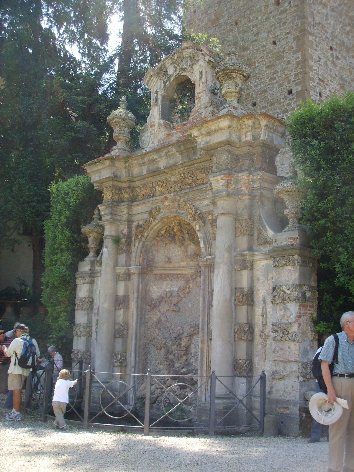 Palazzo dei frescobaldi, grotta